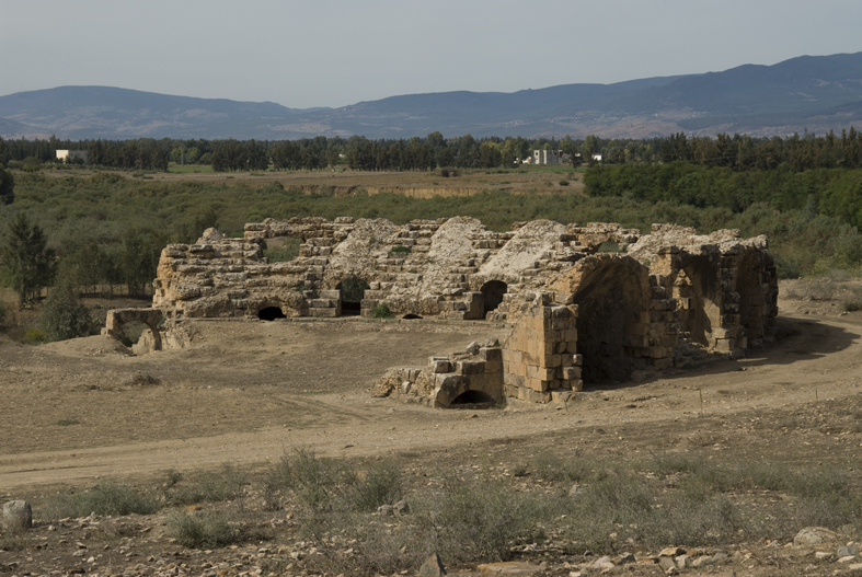 Römisches Theater in Chimtou, Tunesien